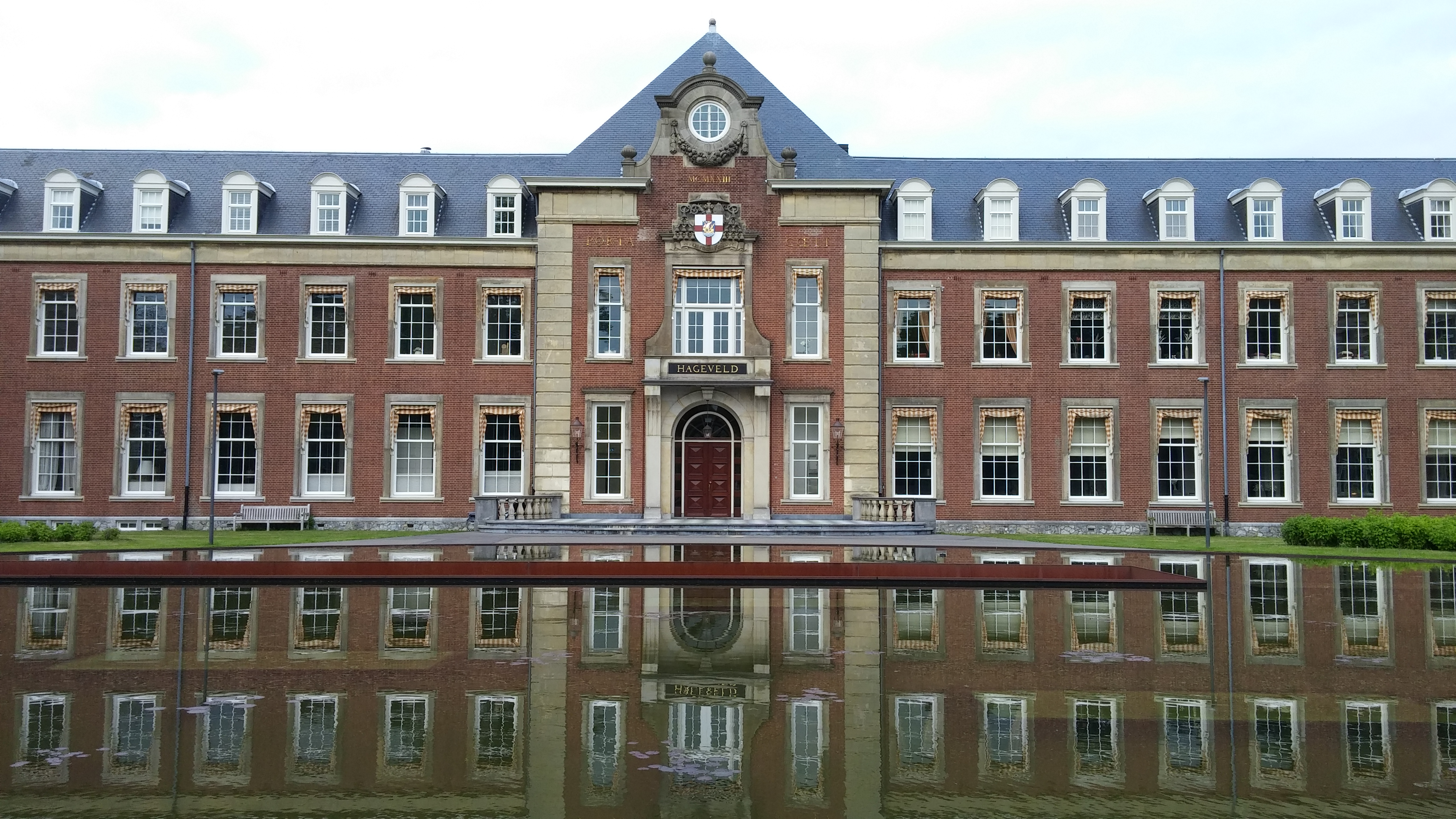 Vooraanzicht Hageveld in Heemstede, Nederland